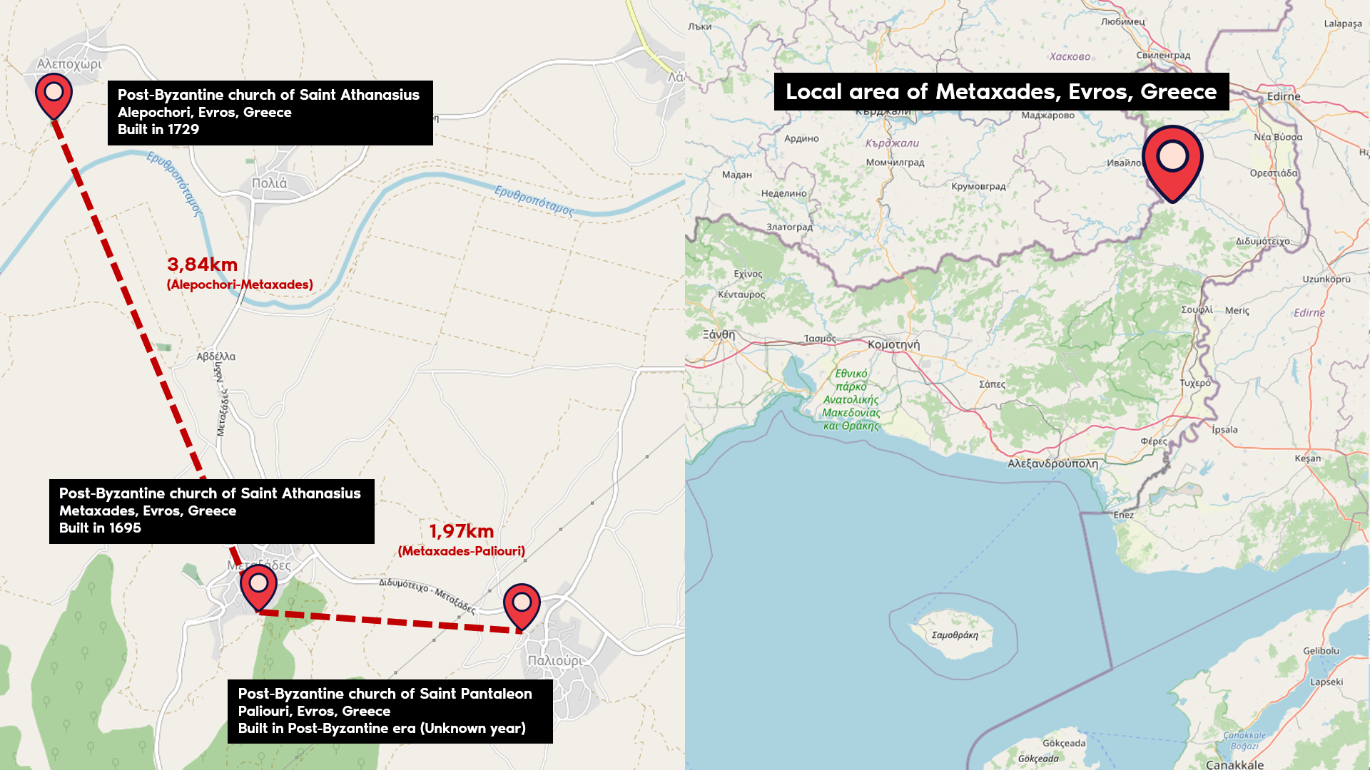 Χάρτης μεταβυζαντινών ναών στην περιοχή Μεταξάδων EN 2.png